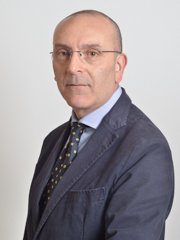 Vito Rosario Petrocelli, politico italiano